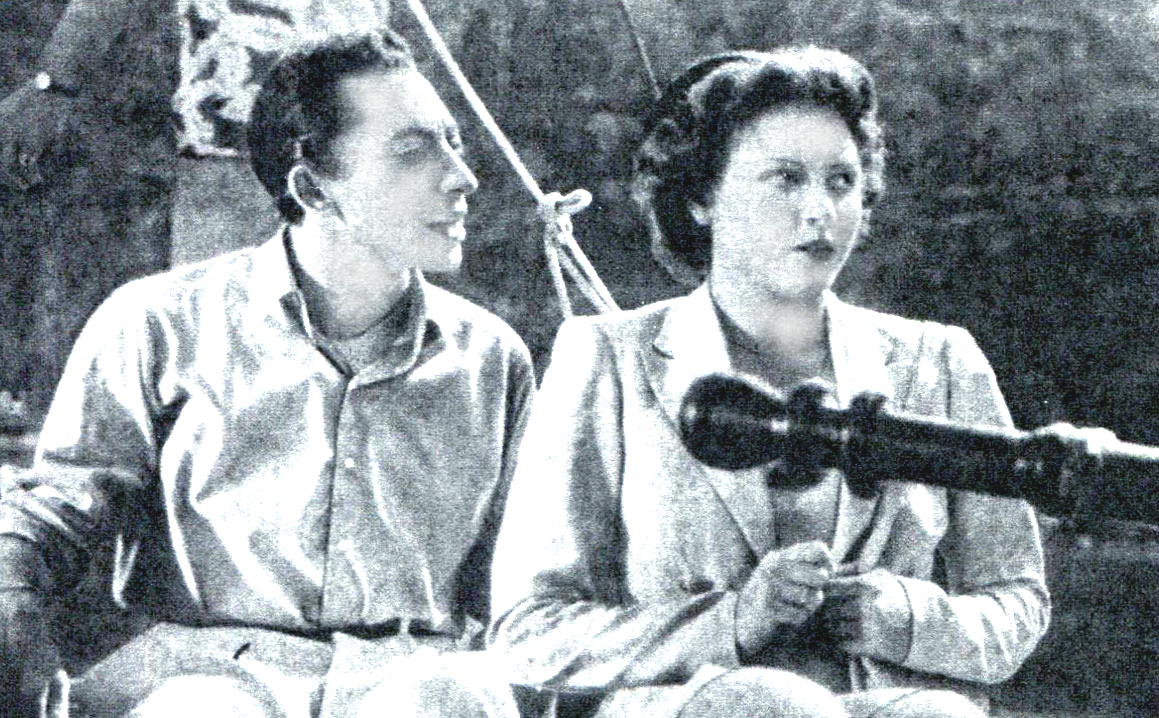 Una scena di "C'è sempre un ma" (Zampa, 1943) con Aroldo Tieri e carla del Poggio